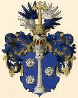 Ulrichi (Pilkuse) suguvõsa aadlivapp